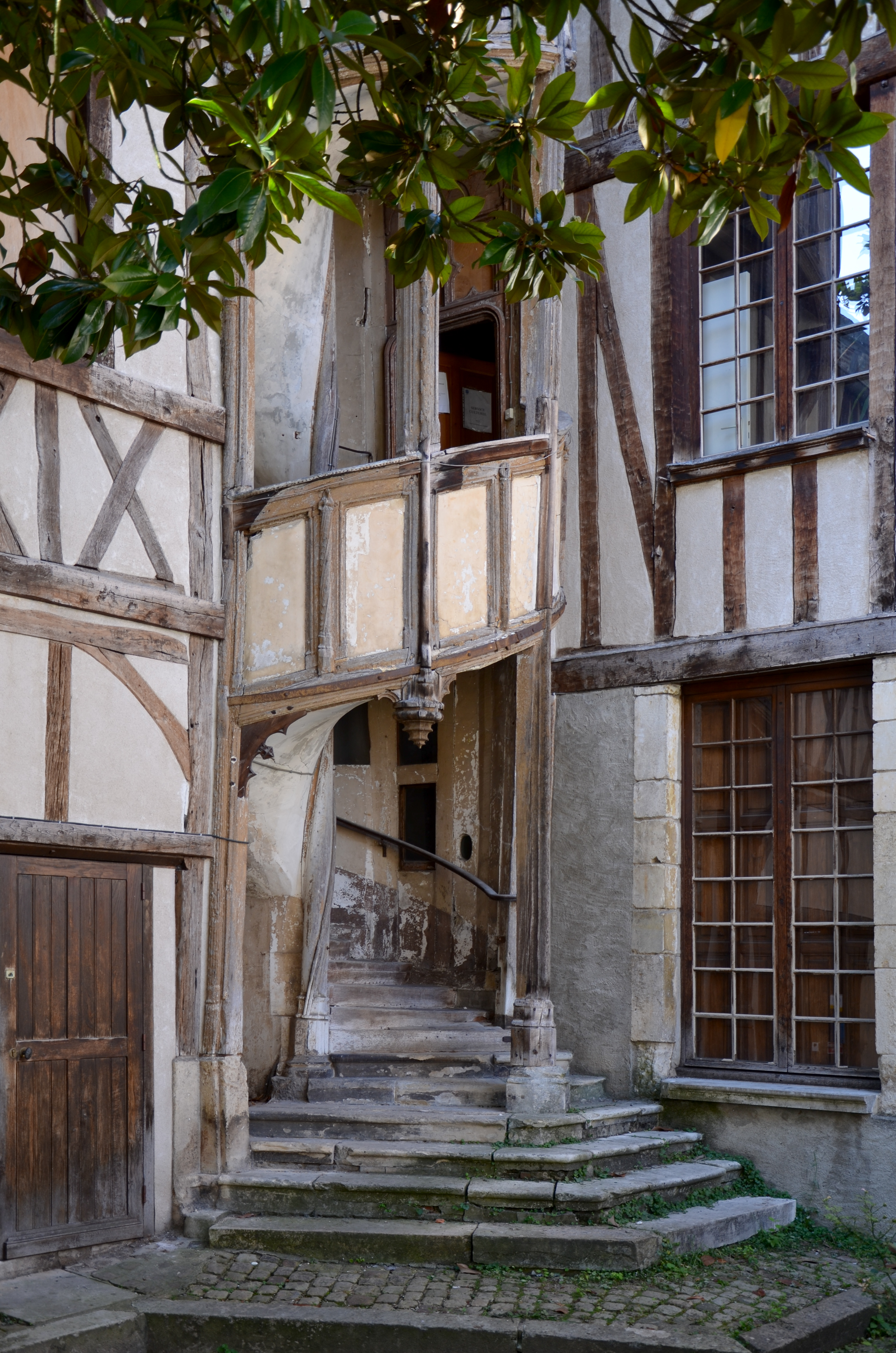 Maison dite de Jean Cousin à Sens, Yonne, Bourgogne, France